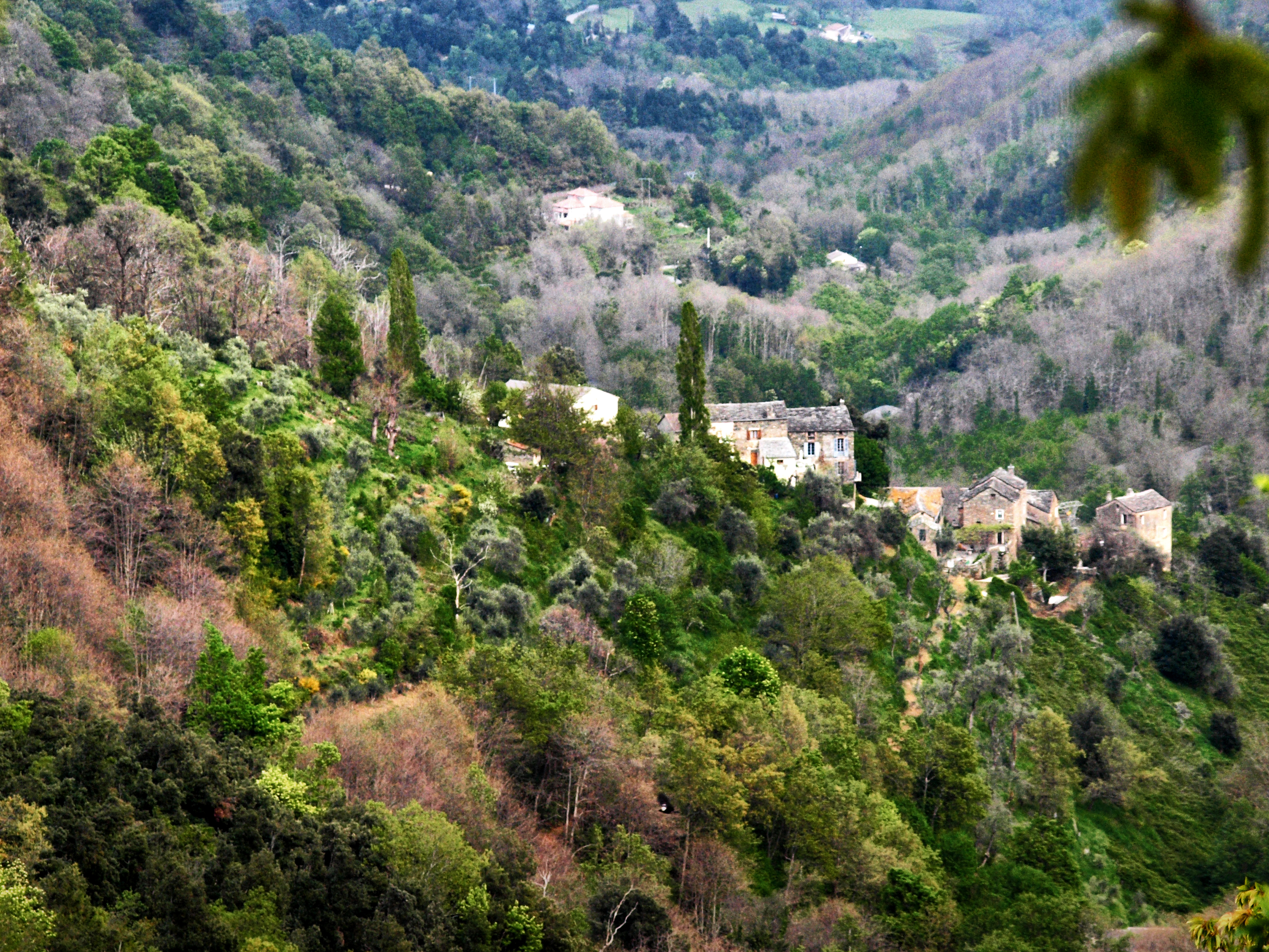 Poggio-Marinaccio, Castagniccia (Corse) - Vue du village